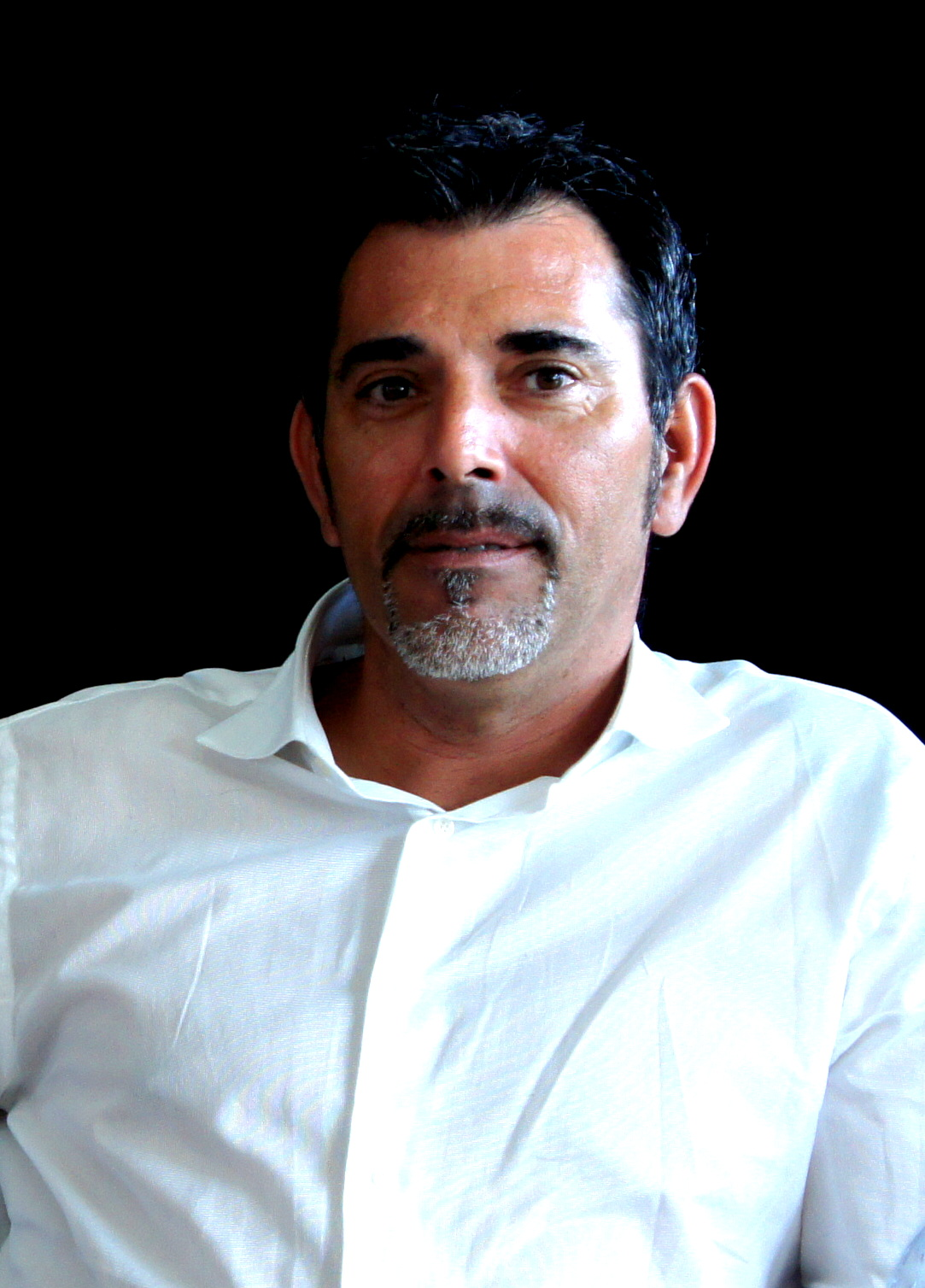 Rencontre avect Victor del Arbol à l'Université Toulouse - Jean Jaurès le 8 octobre 2015